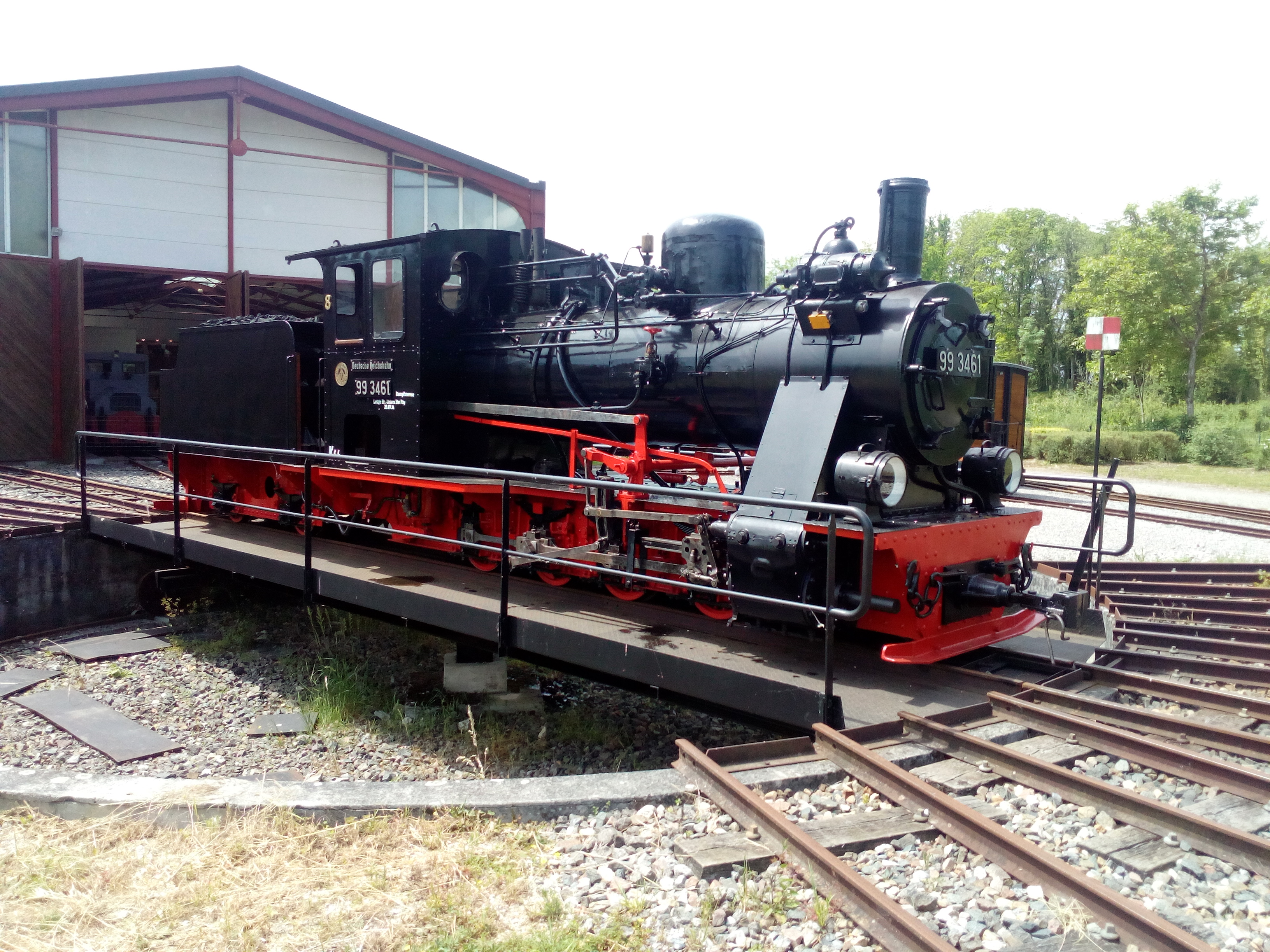 Der Vulcan 99 3461 neu lackiert in seiner ursprünglichen Lackierung (2017.05.28)